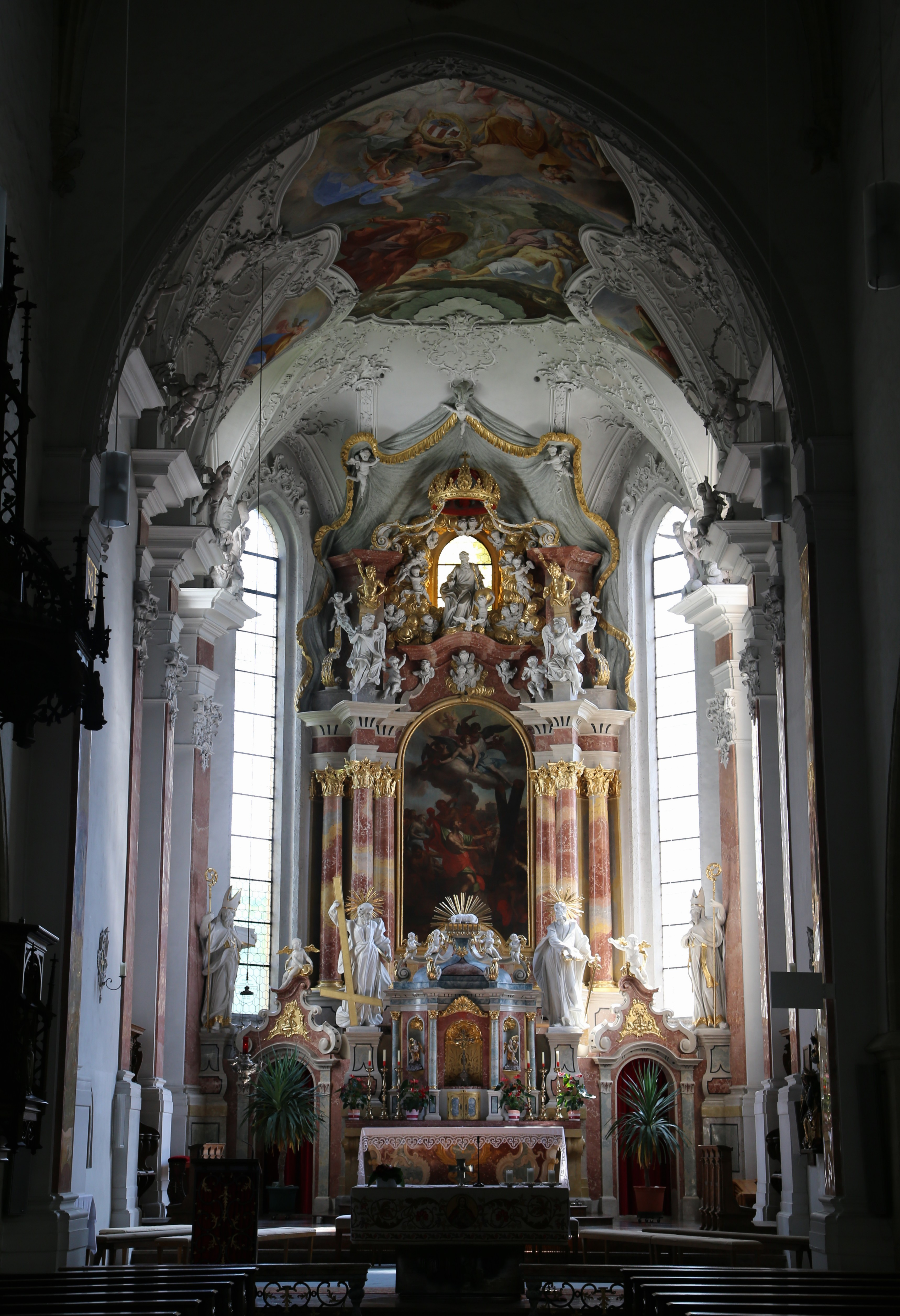 Stadtpfarrkirche St. Andrä, Lienz, Osttirol